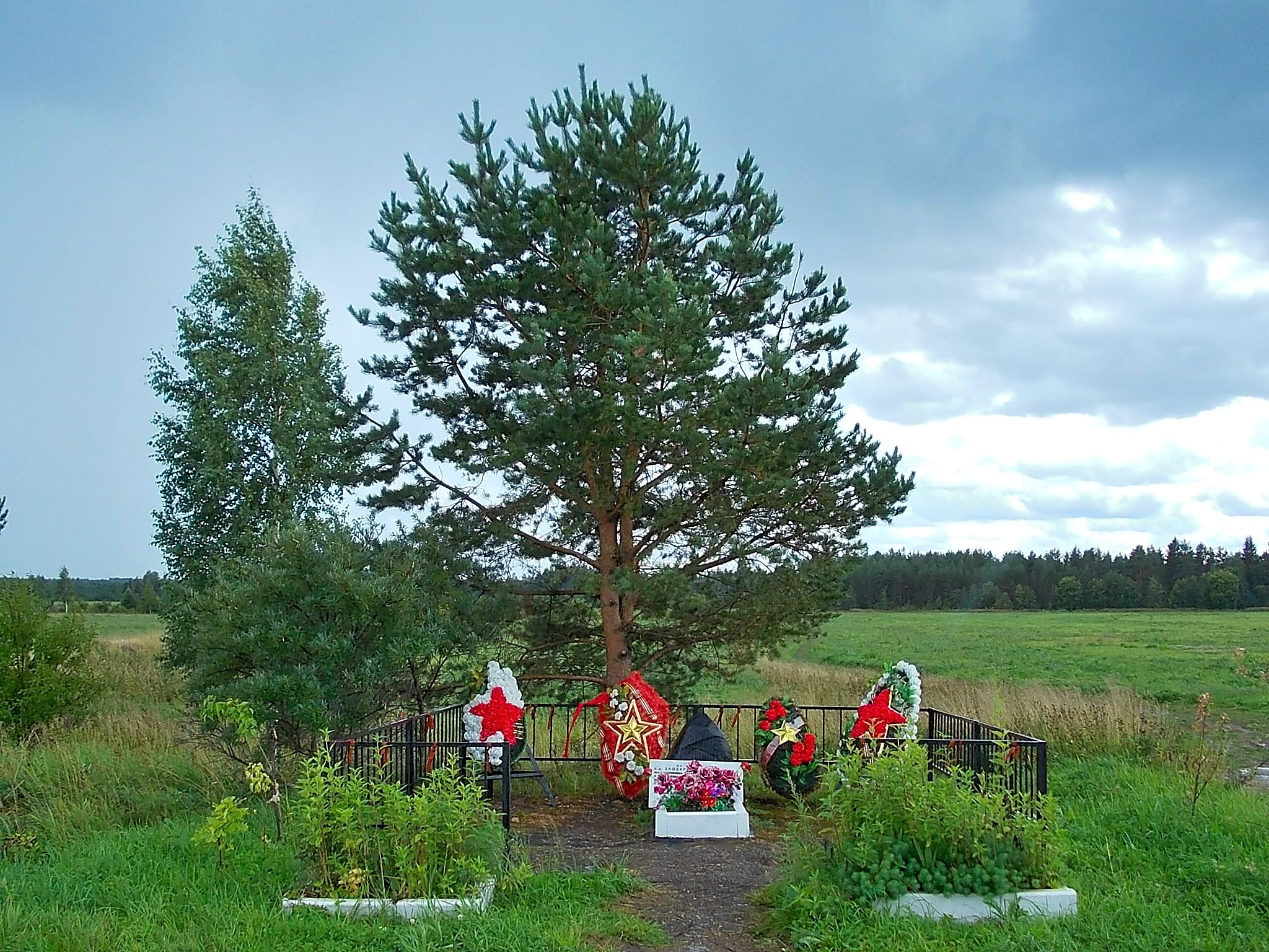 Памятник в д.Заозёрье